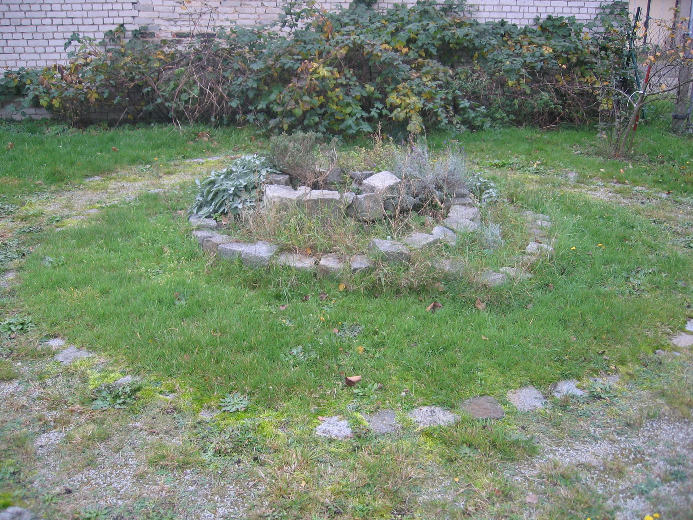 Ruhland, Ortrander Straße, Gartenteil (Ersatz für den Schulgarten der Geschwister-Scholl-Schule) hinter der Turnhalle, Kräuterspirale (aus Projektarbeit der Schule); hinten Brombeerhecke